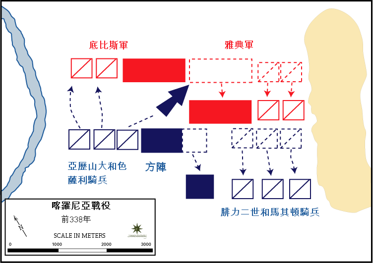 喀羅尼亞戰役圖中文化